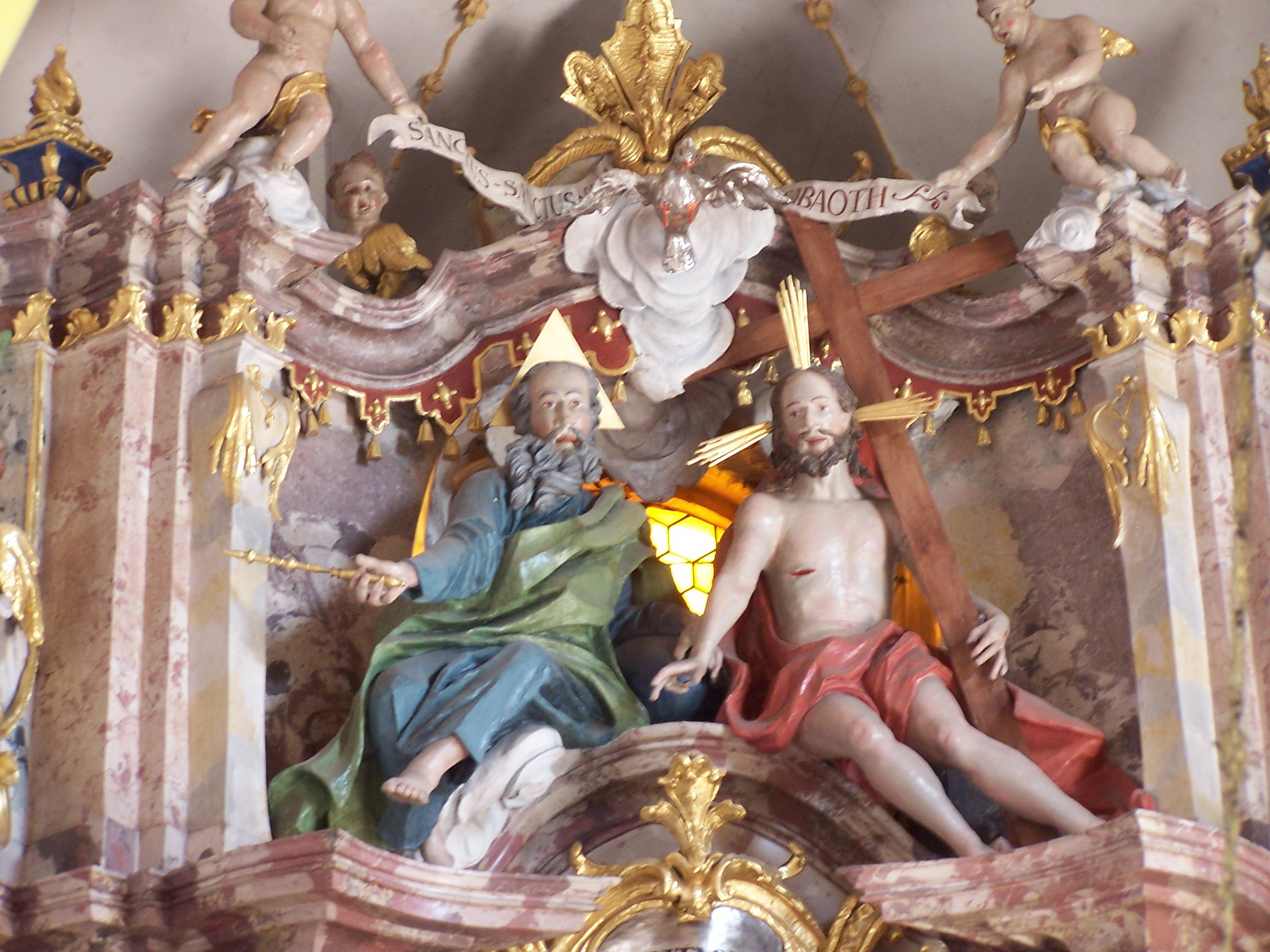 Rottenburg an der Laaber. Oberhatzkofen, Schulweg 3. Katholische Pfarrkirche Mariä Himmelfahrt. Im Aufsatz Holzgruppe der hl. Dreifaltigkeit unter einem lambrequingezierten Baldachin; darüber Engelpaar mit Spruchband.